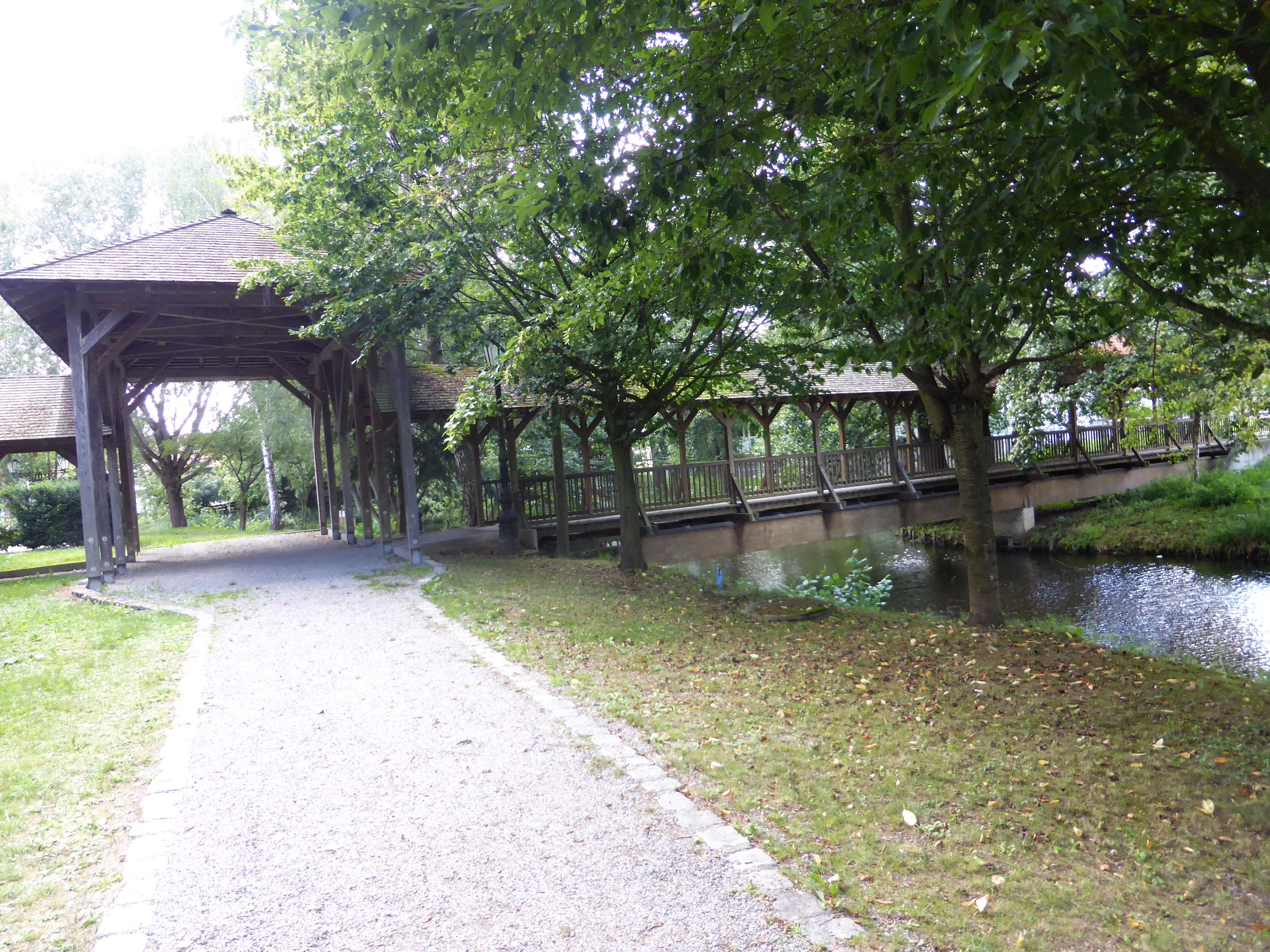 Wasserschloss Gebelkofen